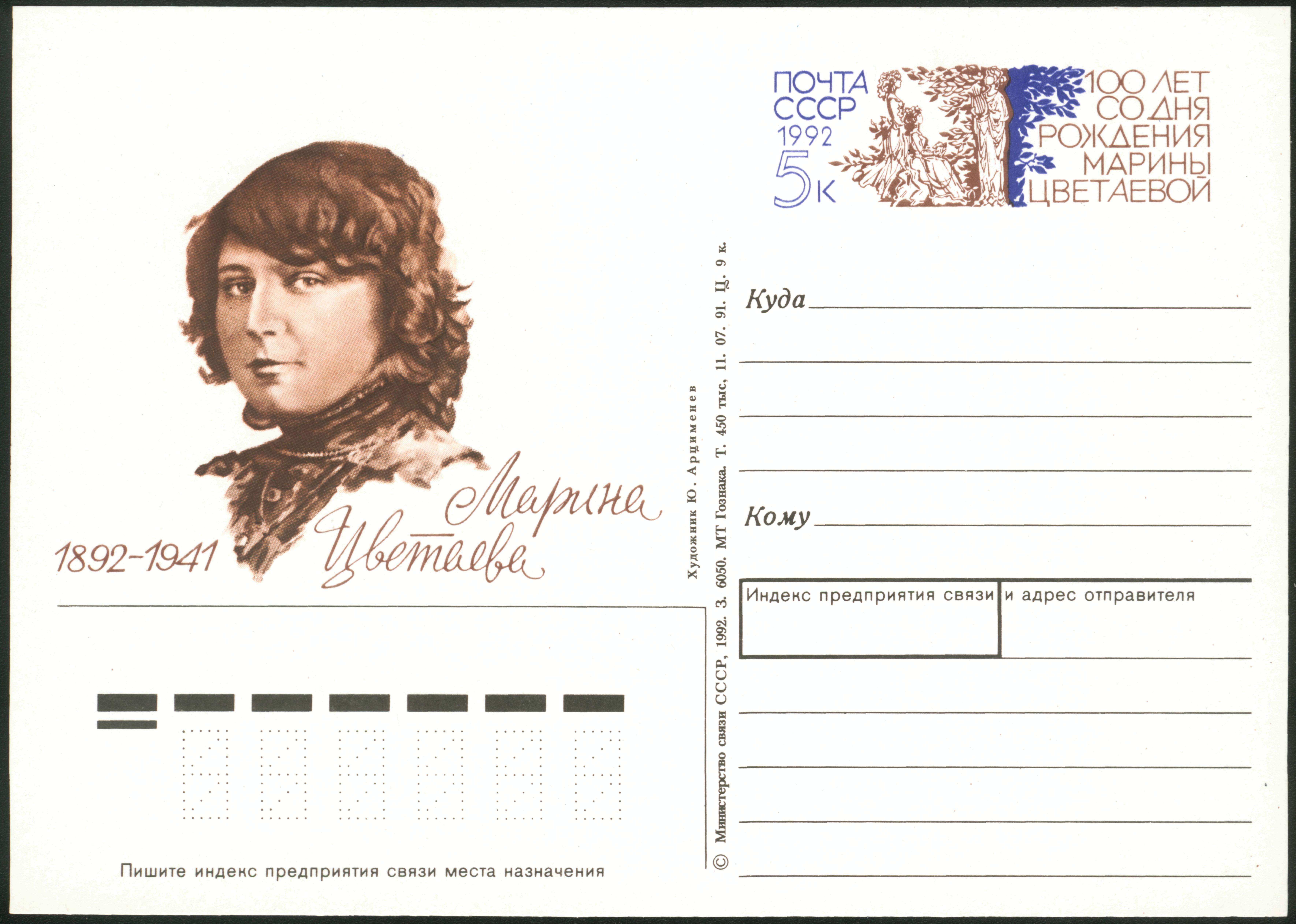 Thsvetaeva USSR original stamp 1992 Марина Цветаева . Односторонняя почтовая карточка СССР с оригинальной маркой. 1992 год. Дата подписания в печать - 11 июля 1991. Тираж 450 тысяч. Воспроизведен автограф Цветаевой.